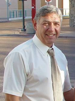 Шаповалов Володимир Іванович — академік АН вищої школи України